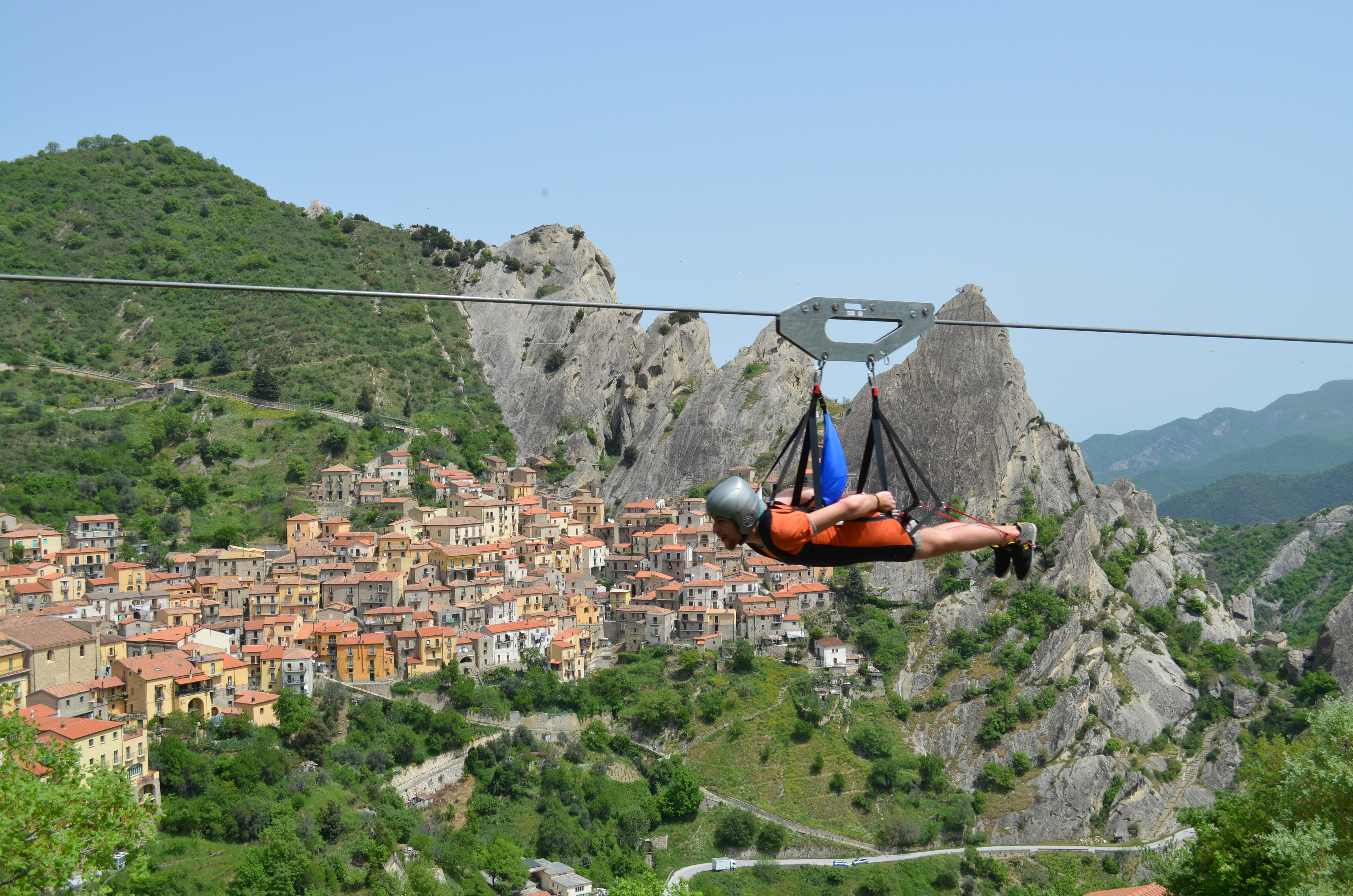 Volo dell’Angelo This is a photo of a monument which is part of cultural heritage of Italy.